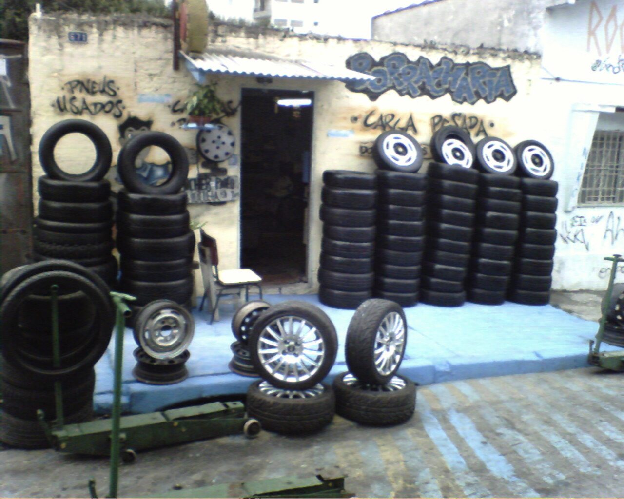 Borracharia no Bairro Engenheiro Goulart, Cidade de São Paulo, Brasil